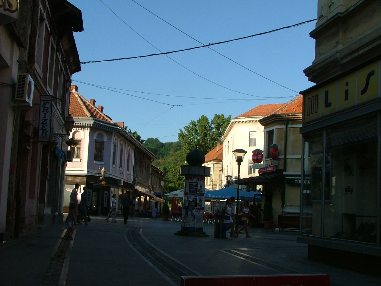 Jevrejska Ulica (Jewish Street) in downtown Tuzla.